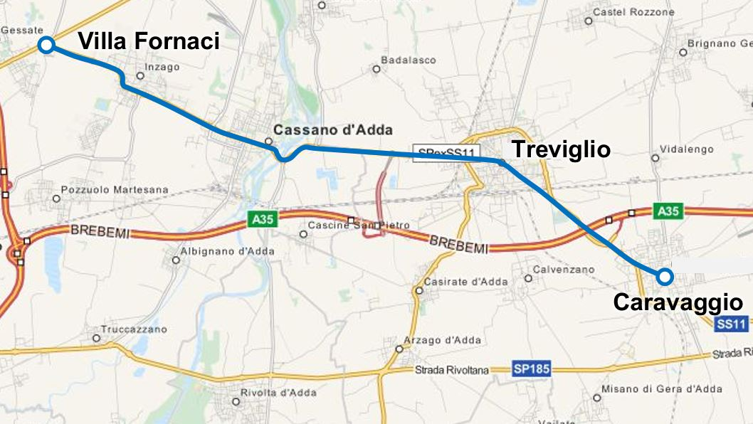 Tranvia Villa Fornaci-Caravaggio